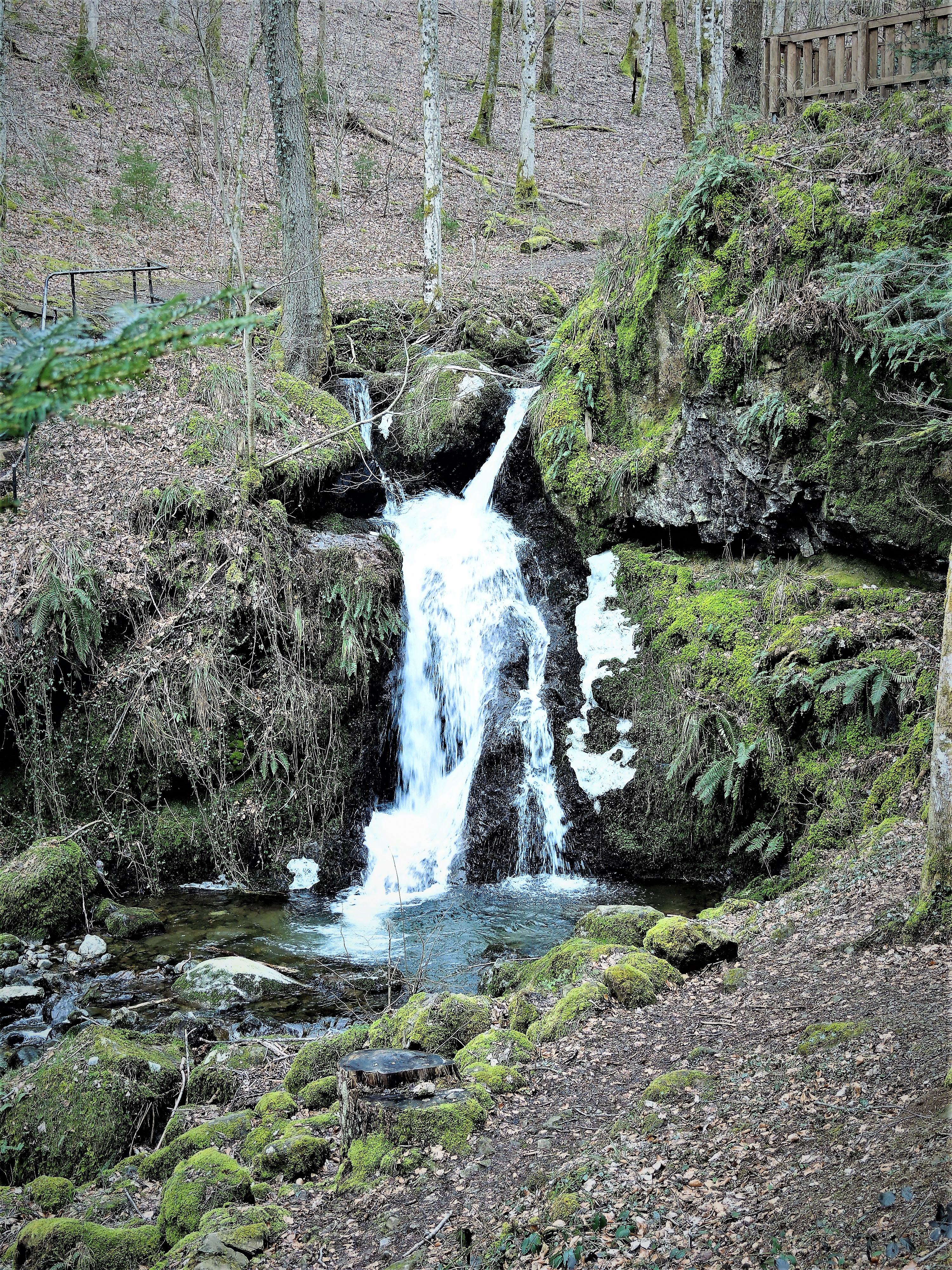 Cascade de Bubalafels. Moosch. Haut-Rhin